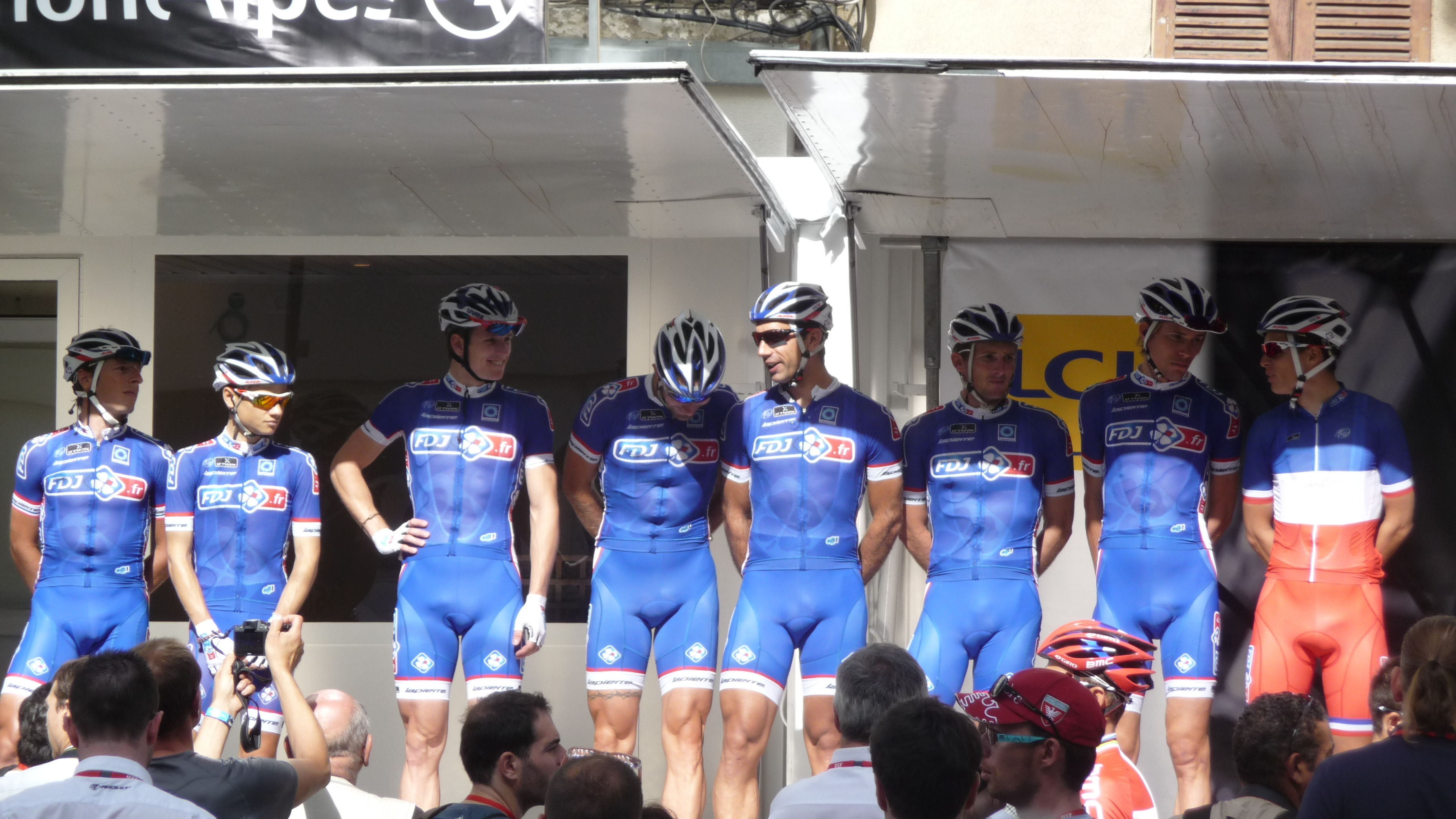 Présentation des équipes du Critérium du Dauphiné 2014 lors du départ de la 2ème étape à Tarare.